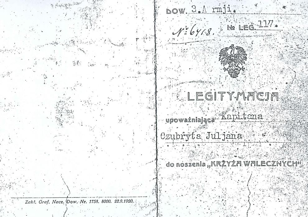 Legitymacja nadania Krzyża Walecznych str. 1